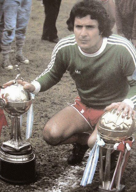 Miguel Ángel Santoro, arquero histórico de Independiente, con las copas.